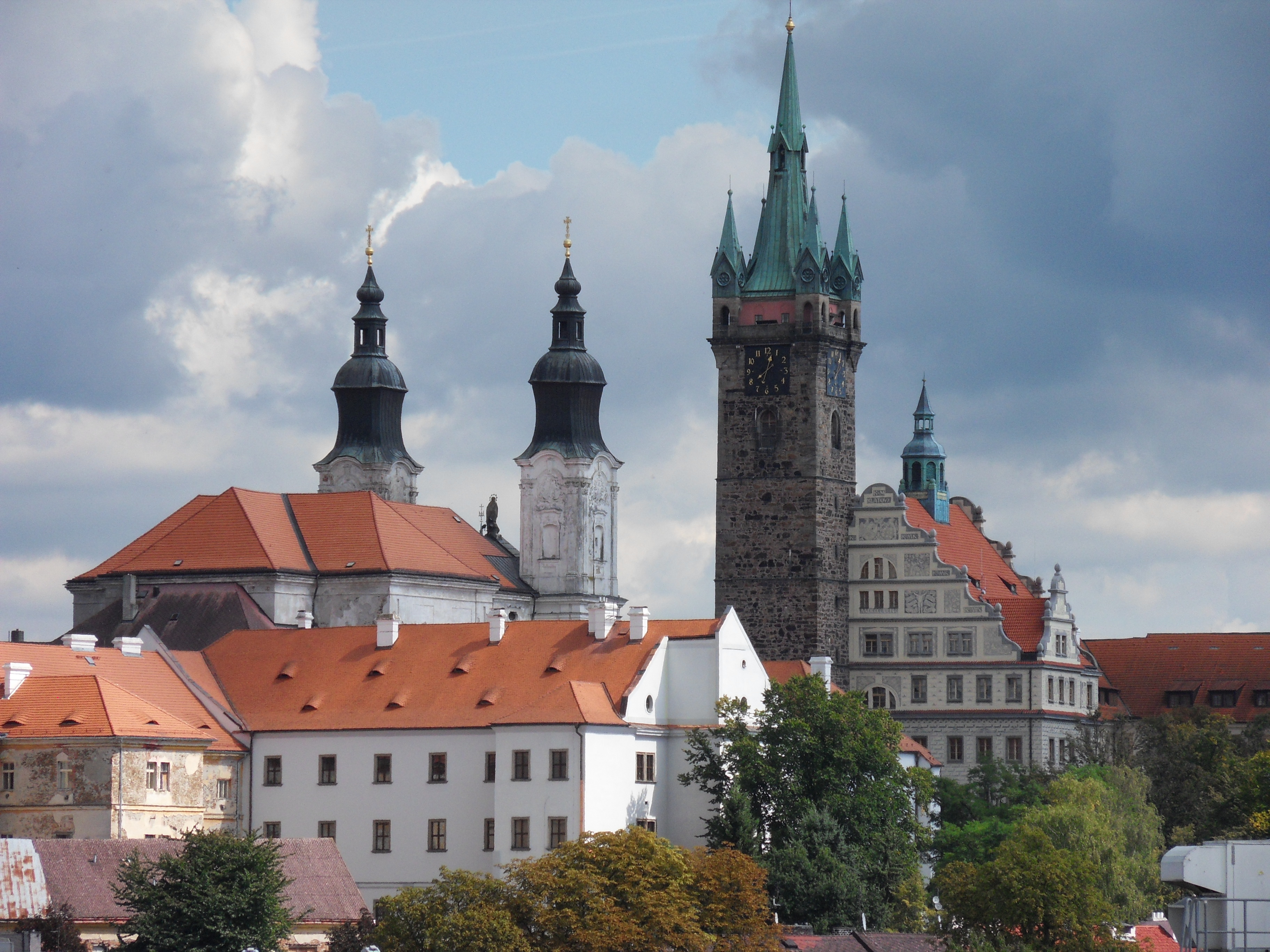 Černá věž, náměstí Míru 60, Klatovy I, Klatovy.